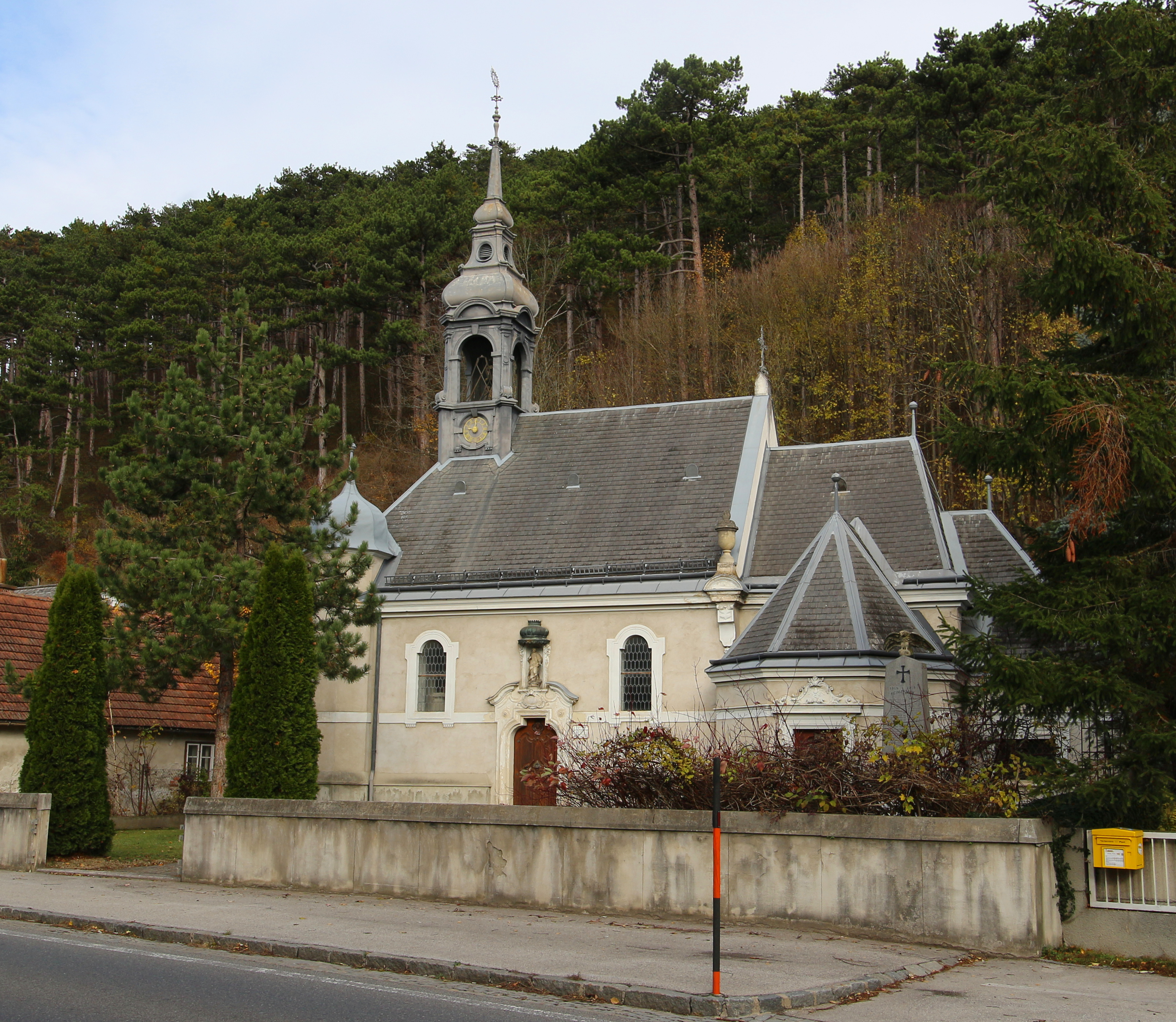 Kath. Filialkirche hl. Katharina in Fahrafeld, Gemeinde Pottenstein, Niederösterreich